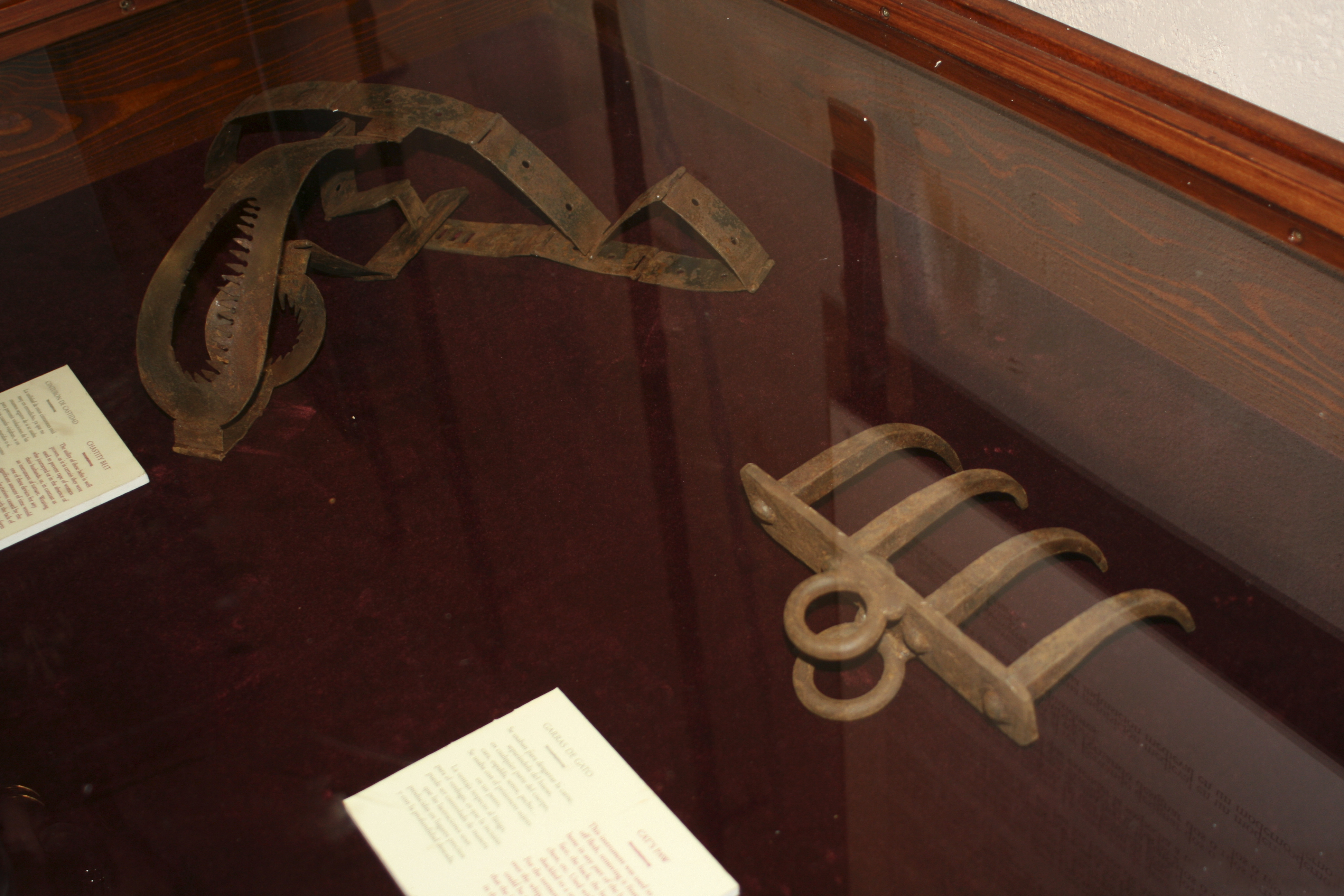 Museo de la Tortura Toledo